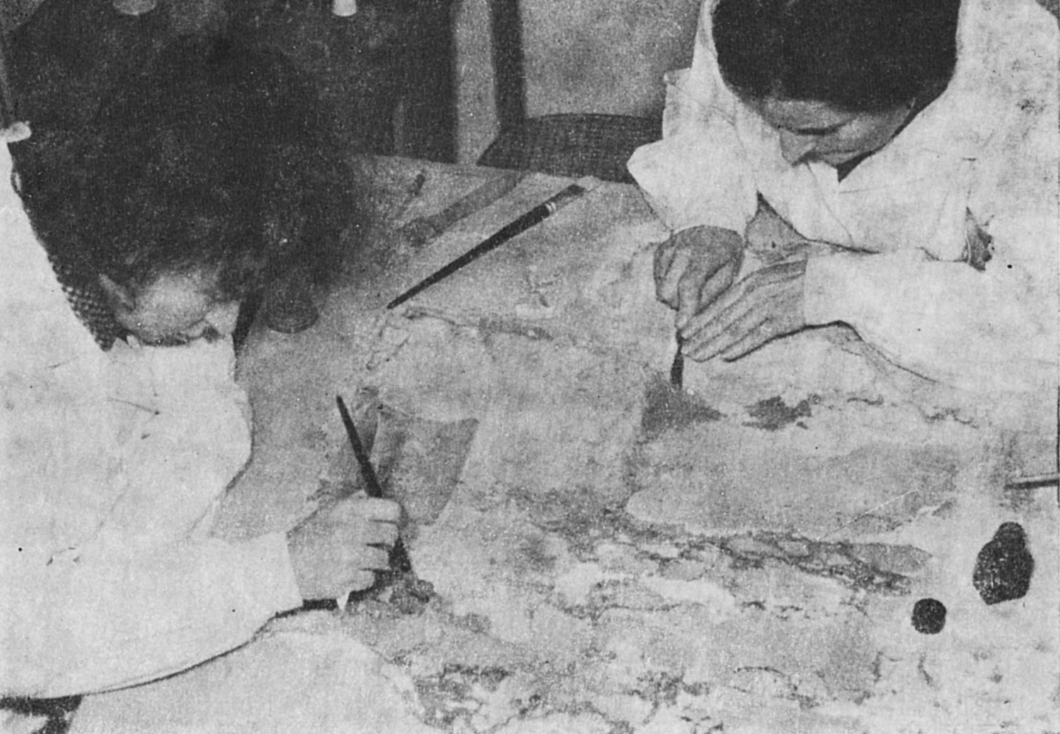 Prace konserwatorskie przy malowidłach z Faras w Muzeum Narodowym w Warszawie. Prace przy odwrociu malowidła.